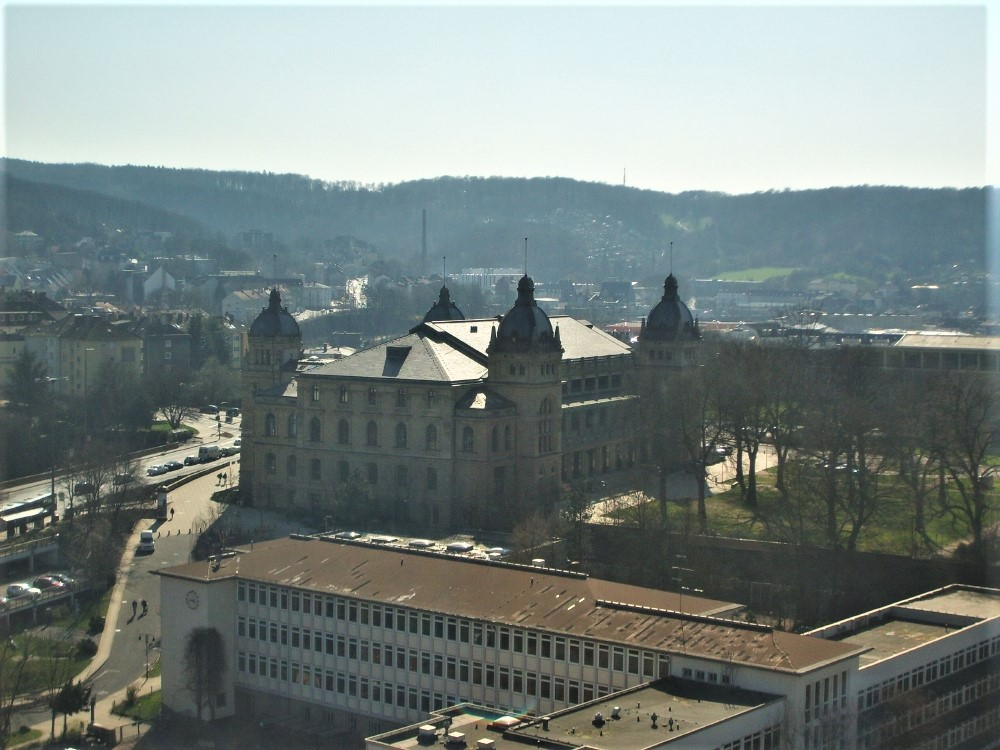 Wuppertal, Stadthalle am Johannisberg von oben